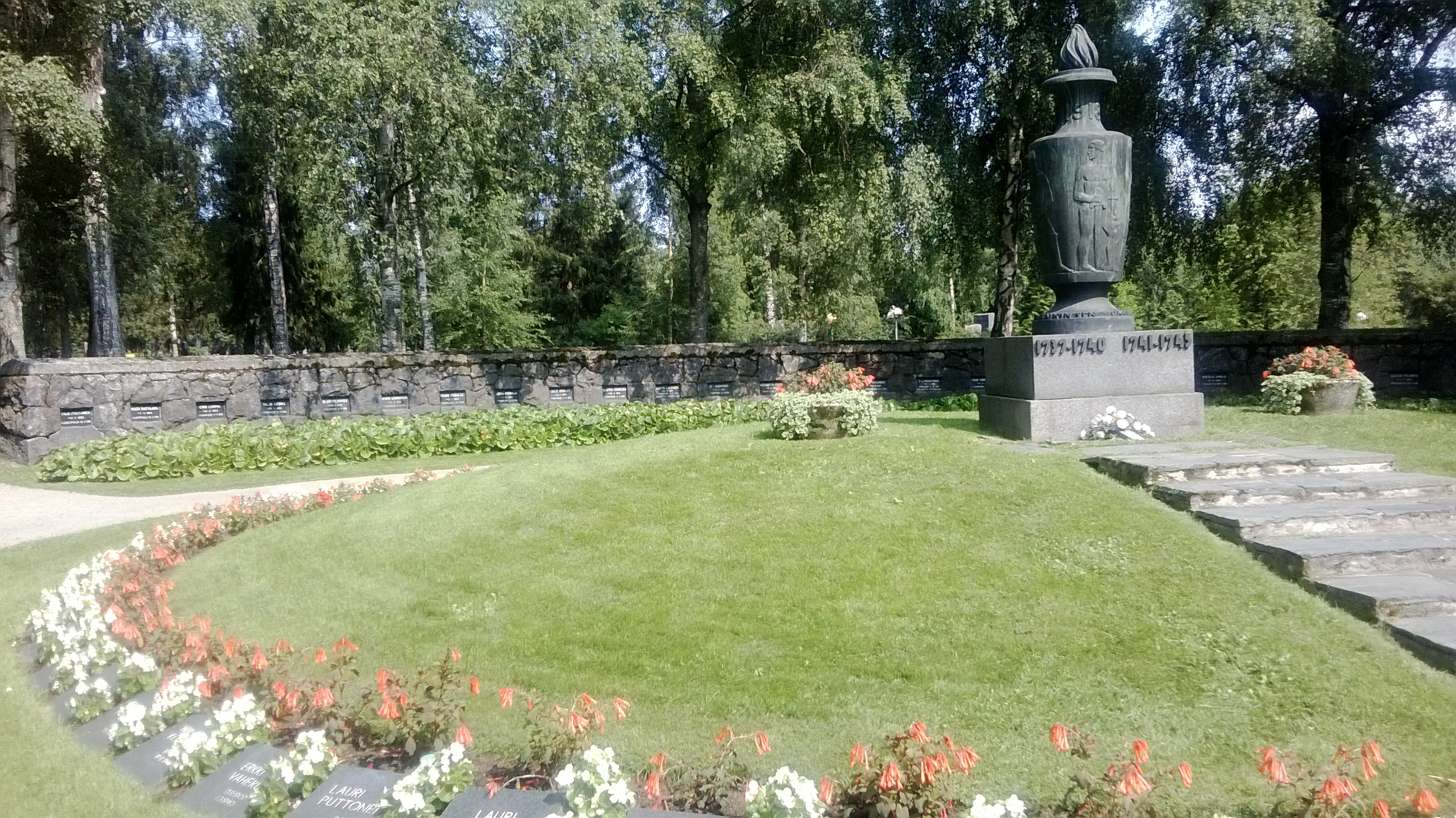 Jyväskylän sankarihautausmaa. Muurin hautakivet sisällissodan, erilliset hautakivet toisen maailmansodan hautoja. Muistomerkki Uhriliekki on Gunnar Finnen työ vuodelta 1922.